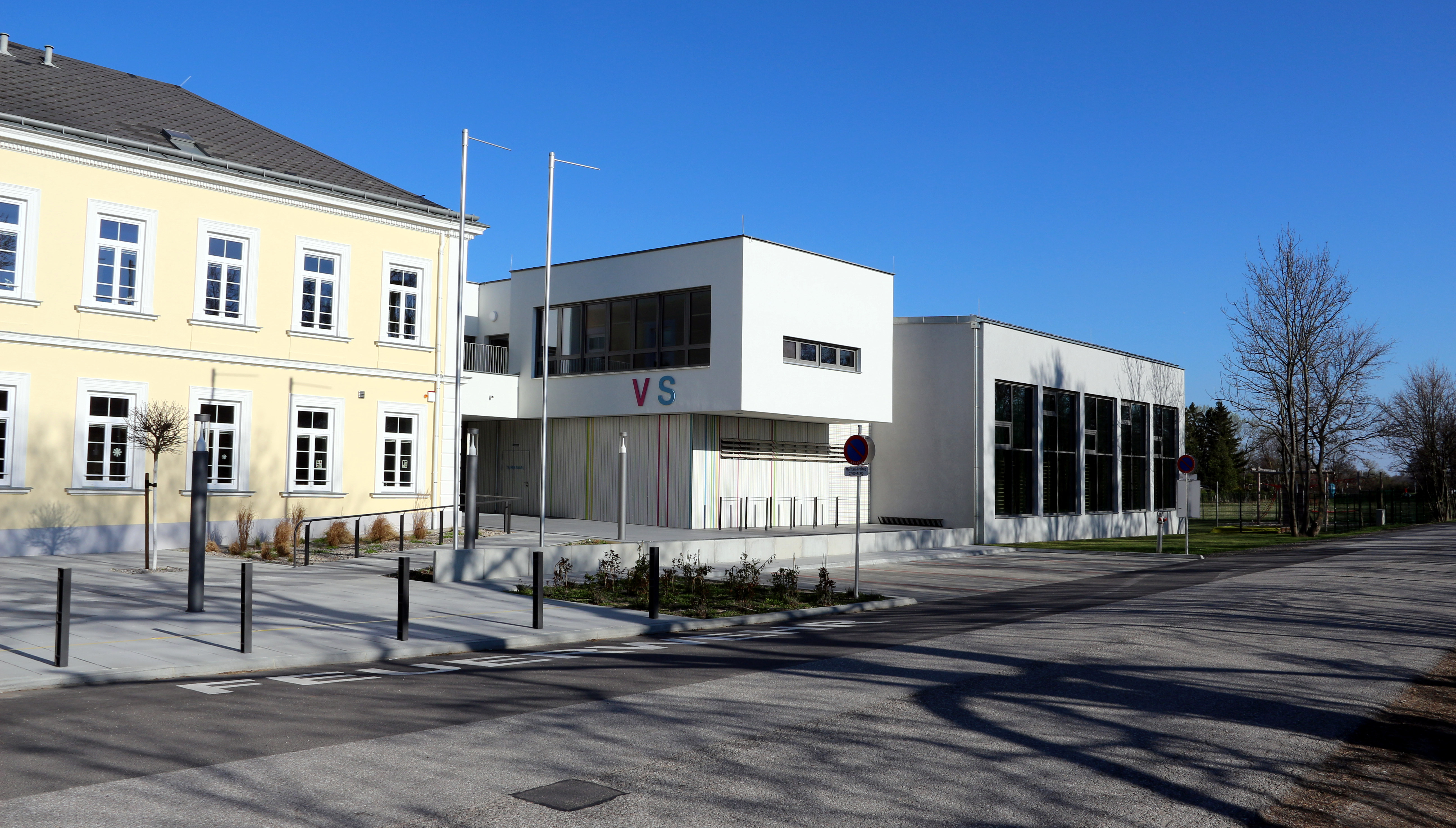 Volksschule Achau, Alt- und Neubau.